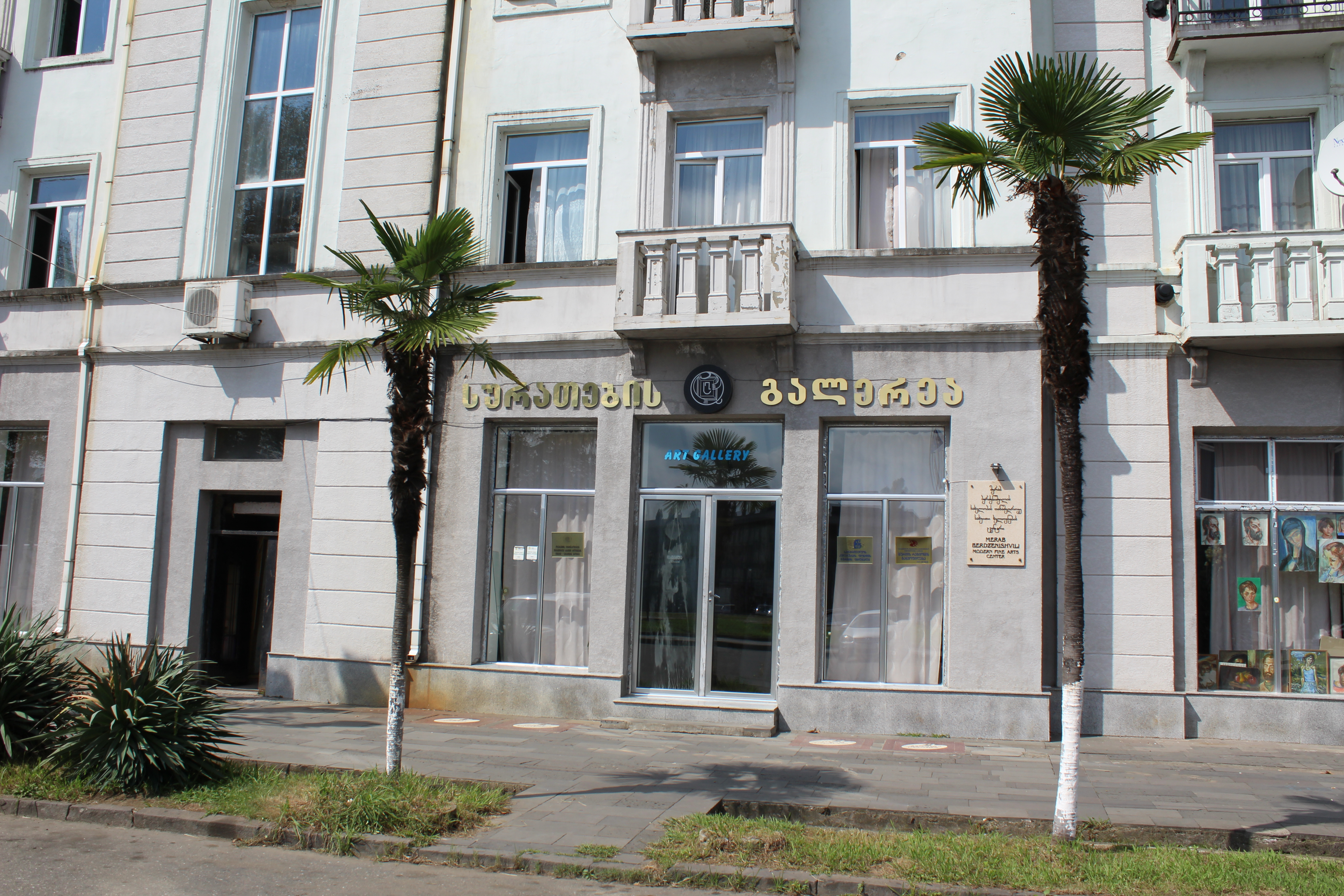 სურათების გალერეა